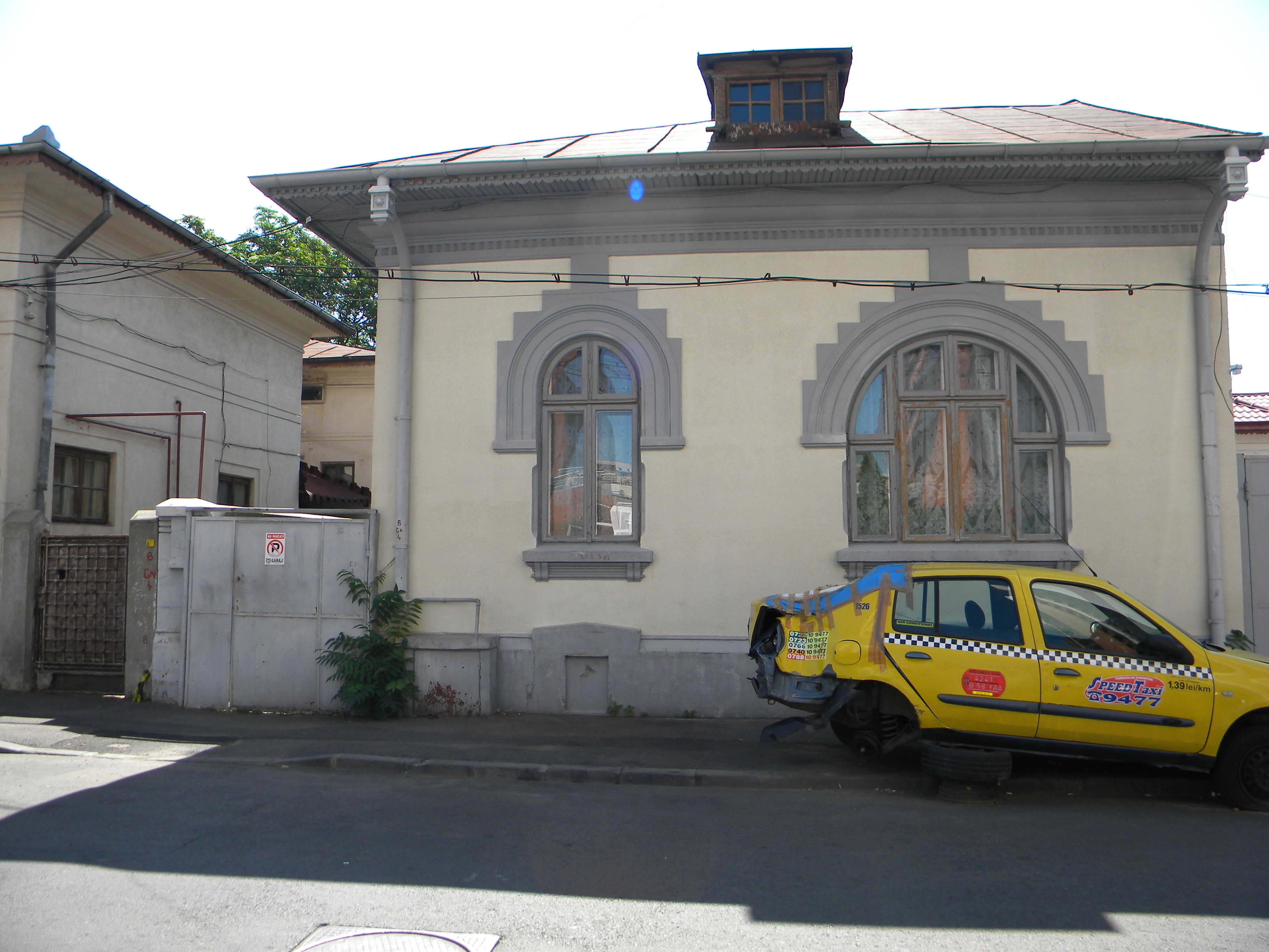 Bucuresti, Romania. Casa pe Str. Constantin Nottara nr. 19. B-II-m-B-19298